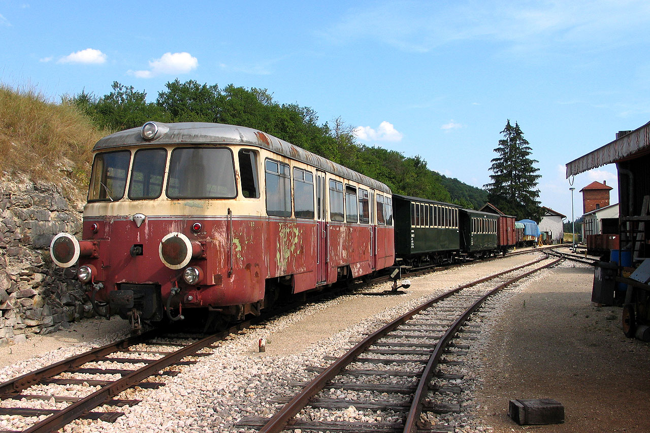 MAN-Schienenbus der Härtsfeld-Museumsbahn